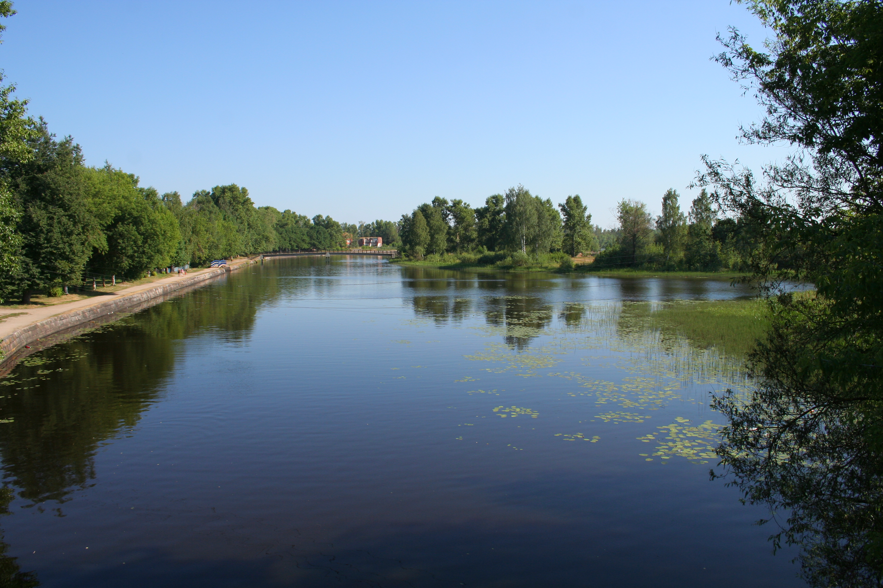 Ansichten der Stadt Wyschni Wolotschok (Oblast Twer, Russland). Der Fluss Zna im Stadtzentrum.